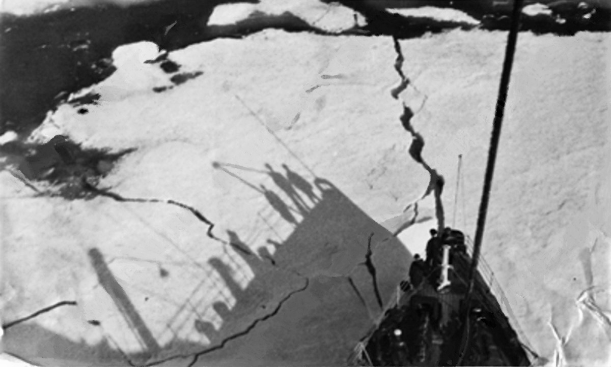 1-й Ленский поход ледокола «Красин». Судно выходит в Карское море